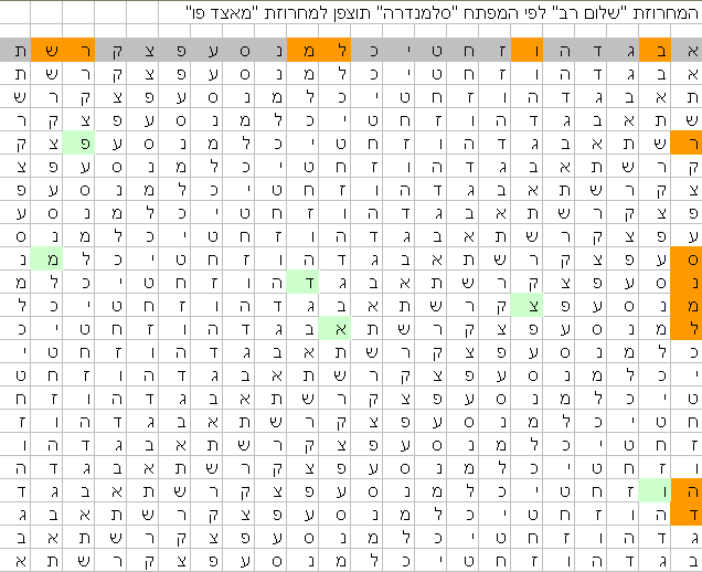 תמונה של שיטת הצפנה סימטרית בשיטה זו היו בידי הצד המצפין והצד המפענח לוח פענוח, והחומר היה נשלח כאשר המפתח היה נקבע מראש והפענוח של כל אות של החומר המוצפן, הייתה נעשית לפי השורה התואמת של המפתח. נוצר על ידי משתמש אפי ב.